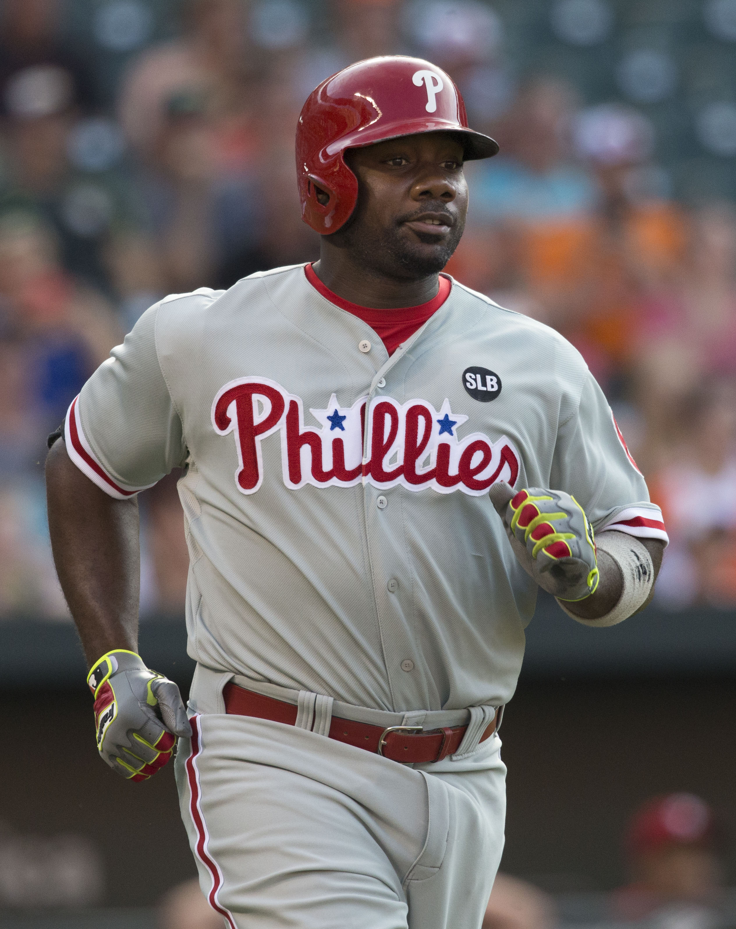 Phillies at Orioles 6/16/15